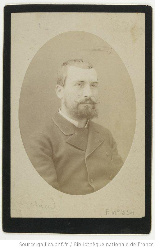 Portrait de l'explorateur Victor Giraud